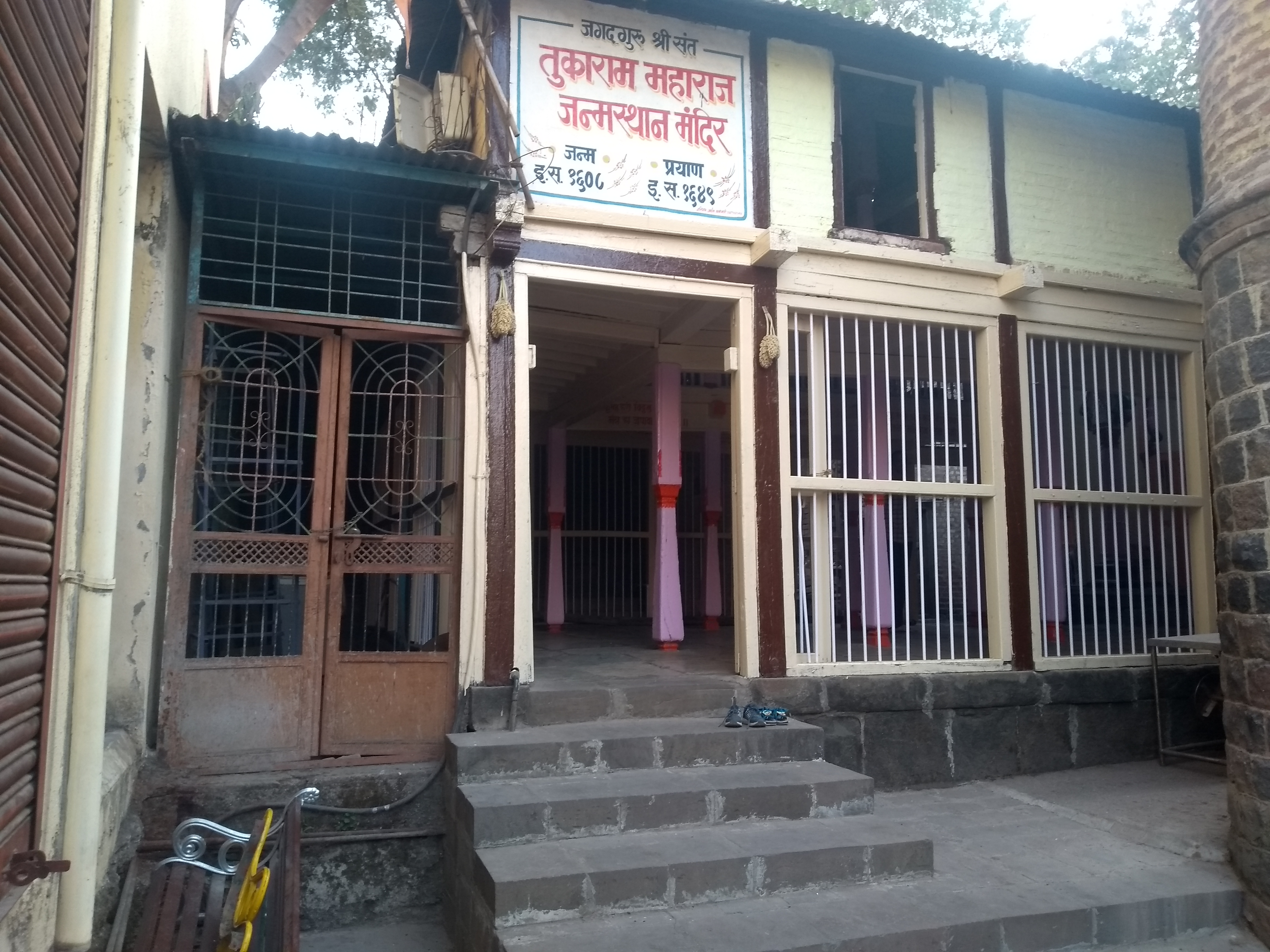 तुकाराम महाराज यांचे जन्म व वसतीस्थान, देहूगाव